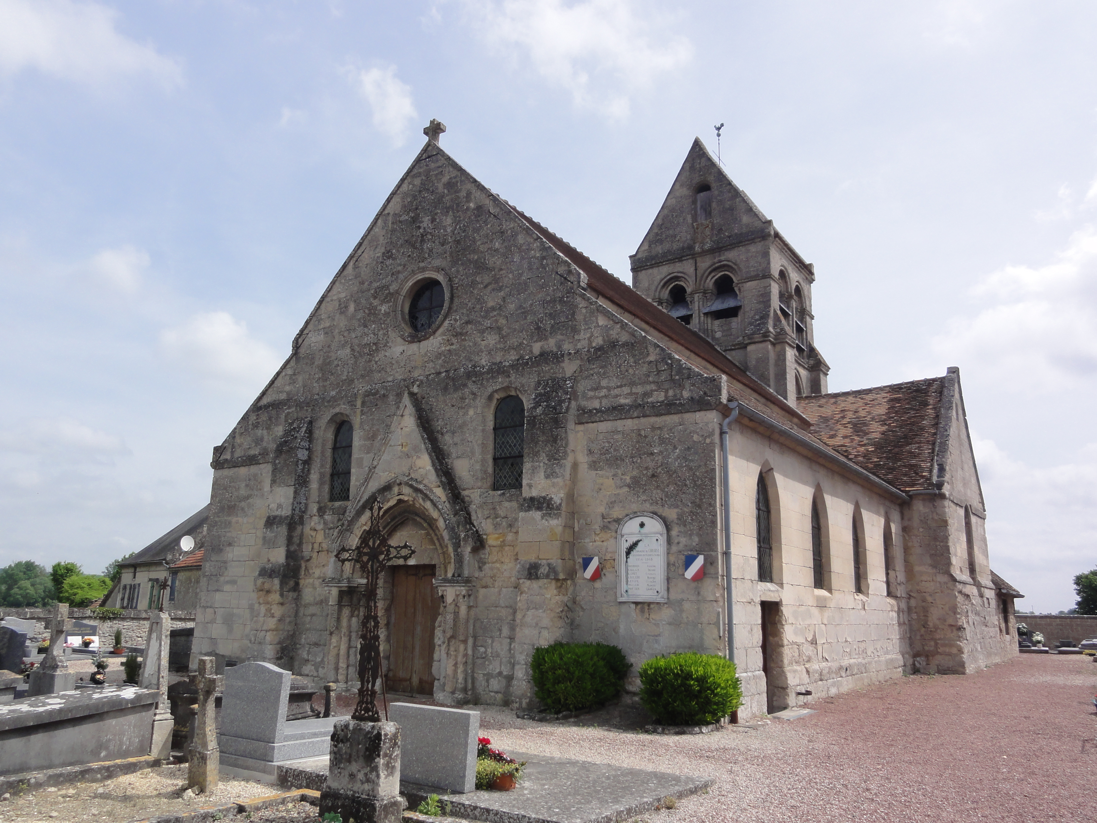 Couloisy (Oise) Église .